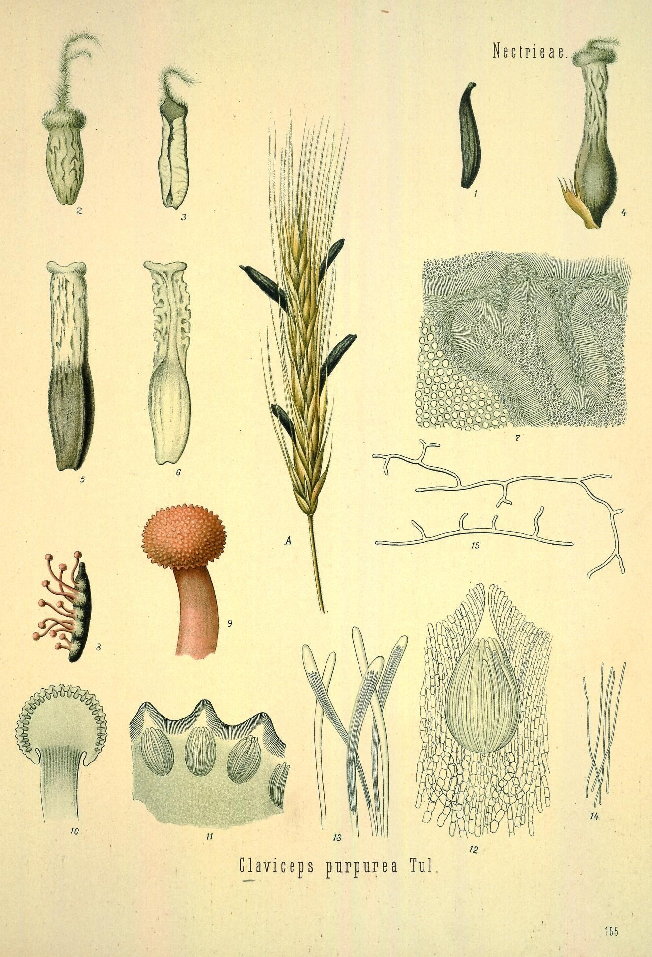 Nectrieae. Claviceps purpurea Tul